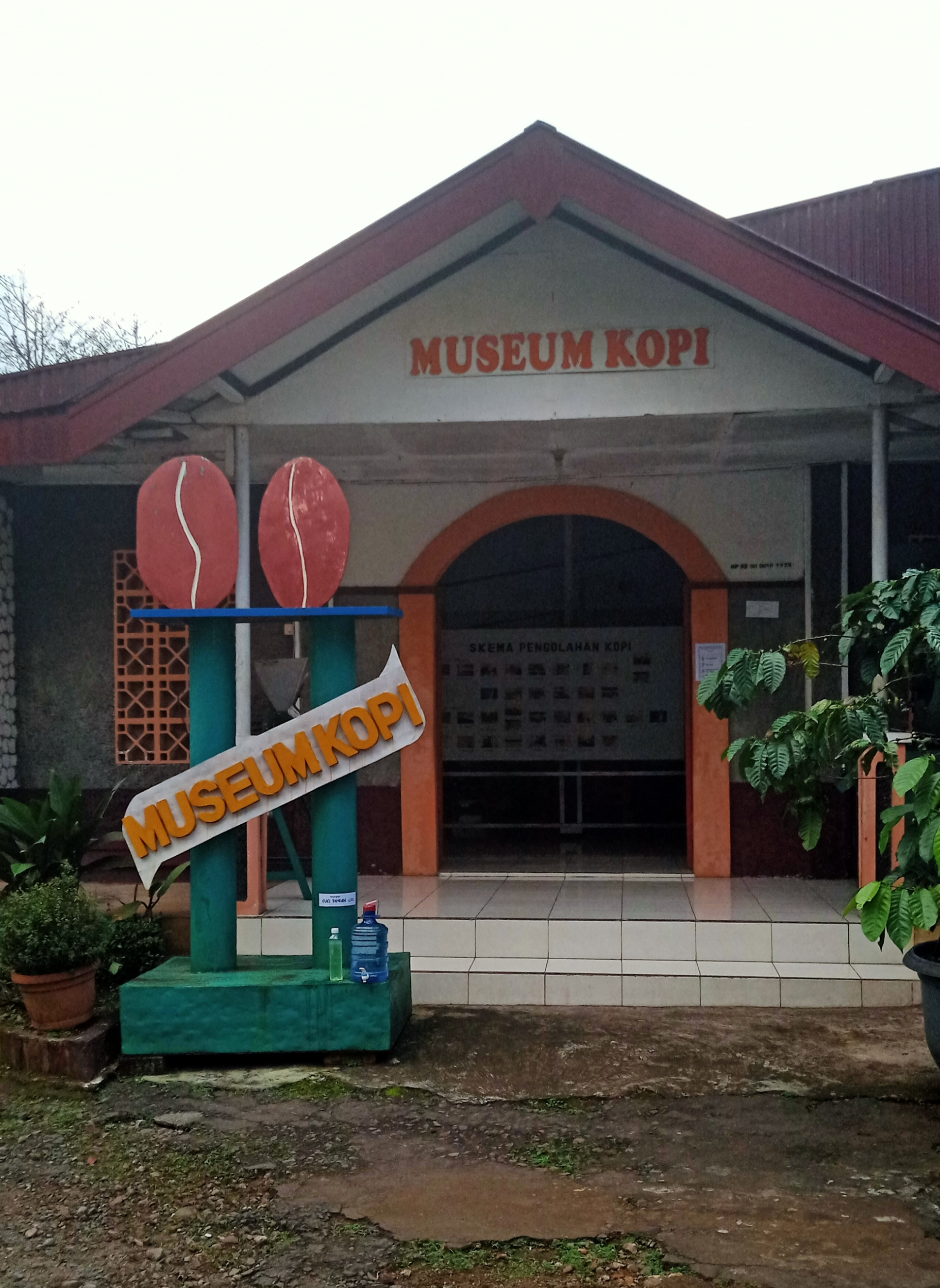 Museum Kopi Banaran